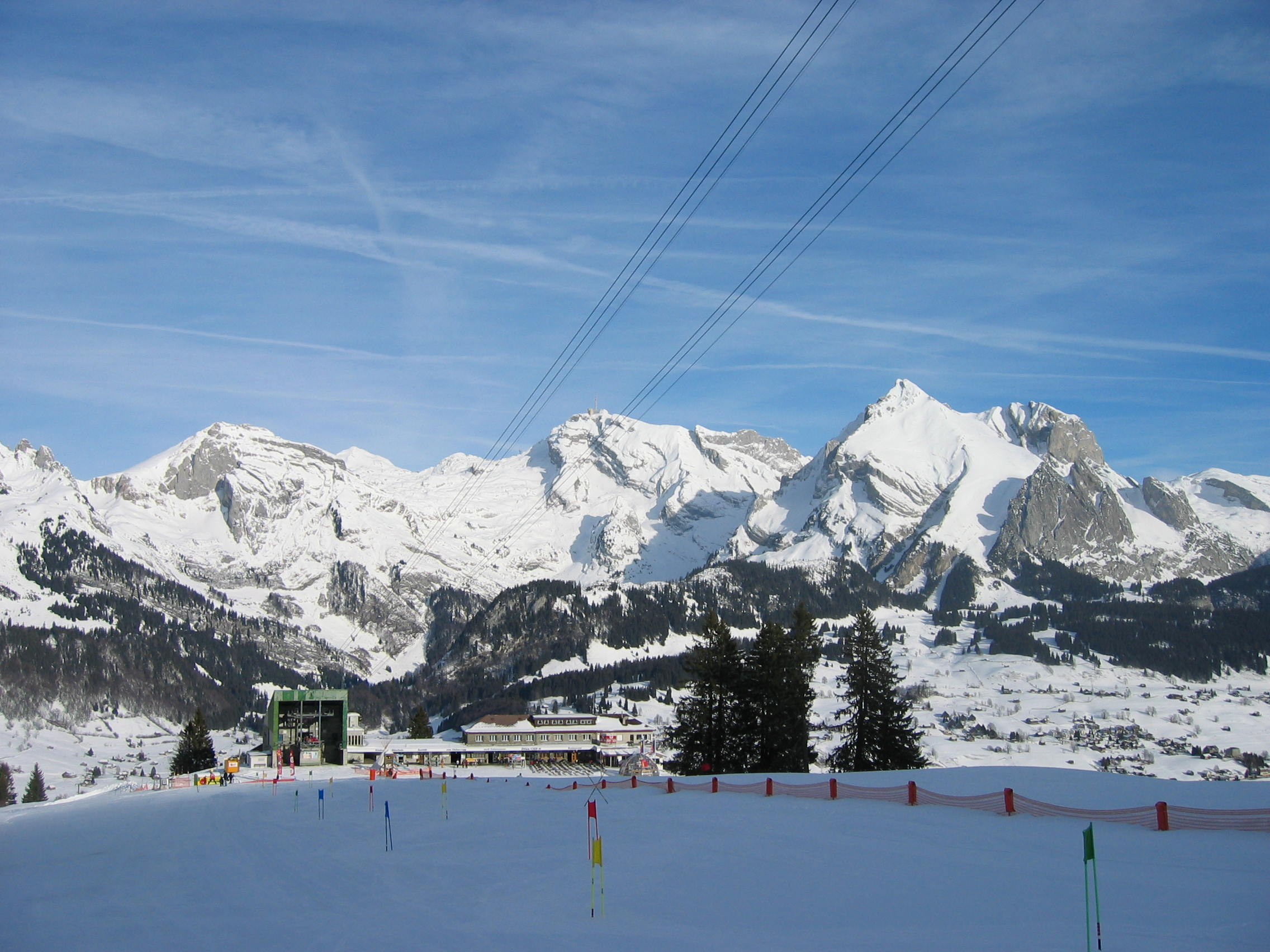 Säntis vom Iltios aus gesehen